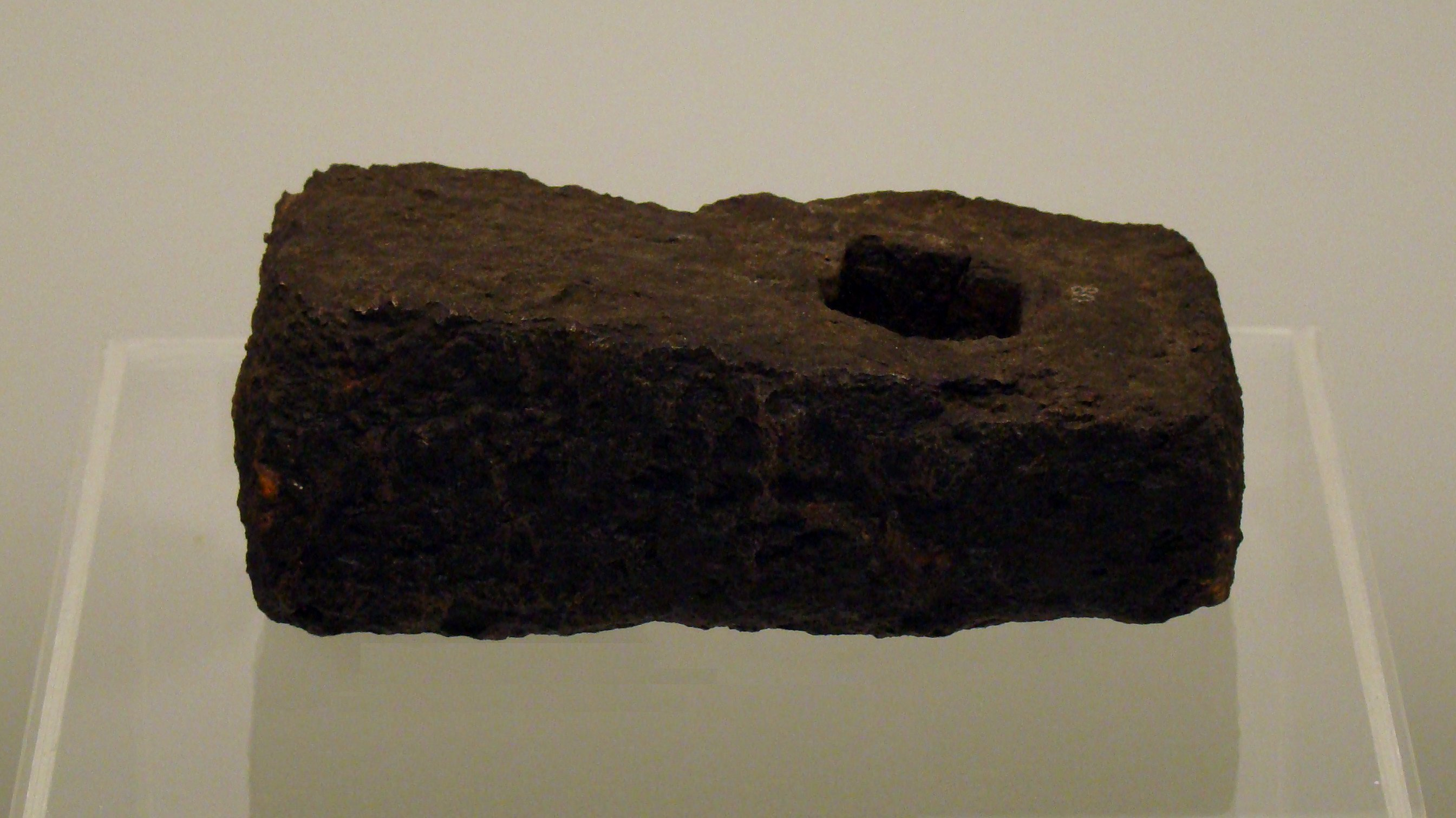 jedyny odkryty w Polsce egzemplarz młota kowalskiego z okresu halsztackiego (osada obronna w Wicinie). Muzeum Archeologiczne Środkowego Nadodrza w Świdnicy